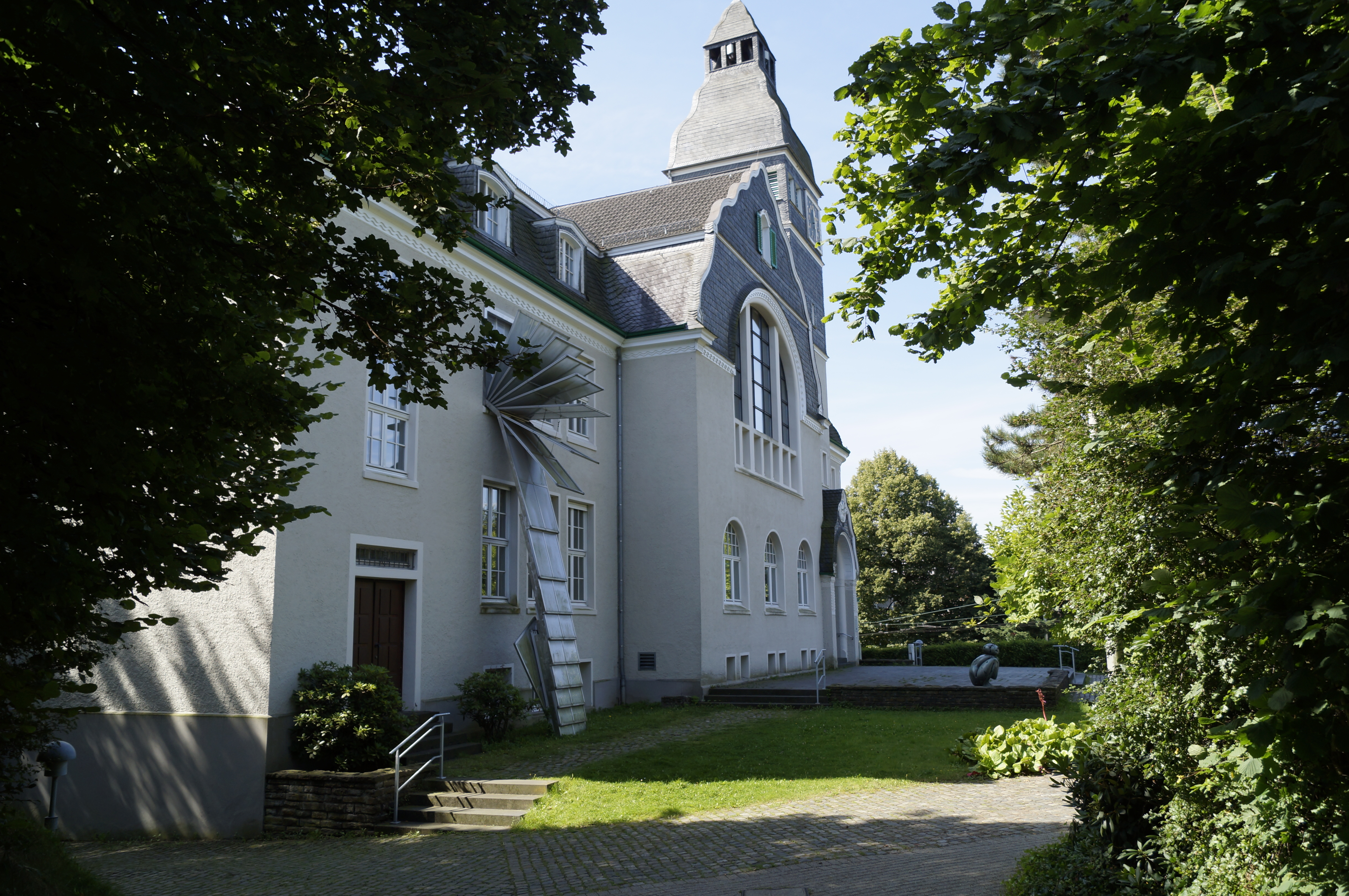 Das Zentrum für verfolgte Künste befindet sich im Gebäude des Kunstmuseums Solingen © Zentrum für verfolgte Künste, Solingen